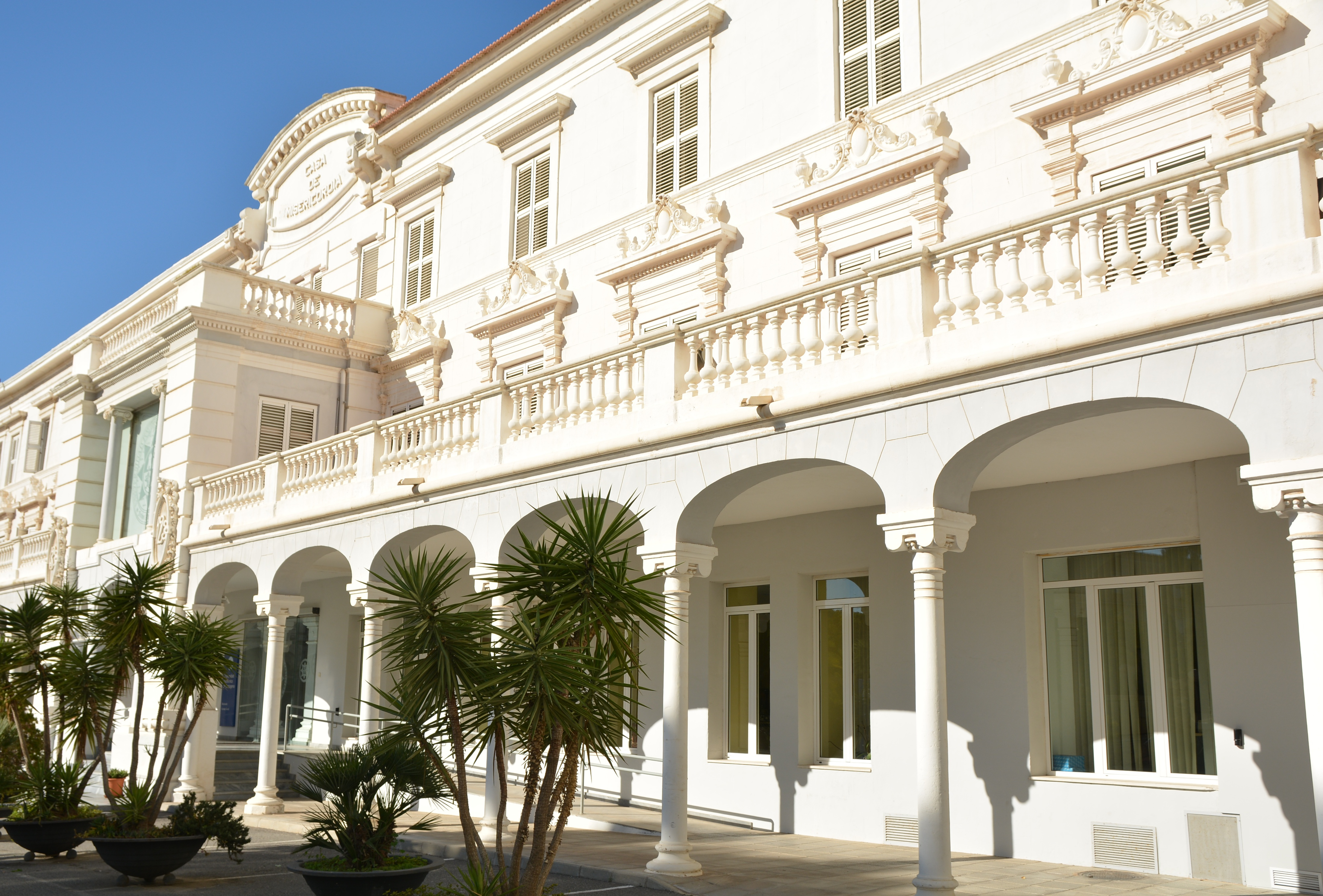 Edificio La Milagrosa, rehabilitado en 2001 como sede de la Universidad Politécnica de Cartagena.